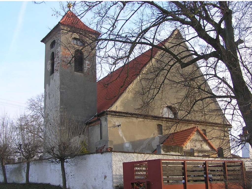 Obec Řepice (okres Strakonice) - kostel sv. Maří Magdaleny.